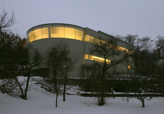 Rodinný dom na Červenom kopci